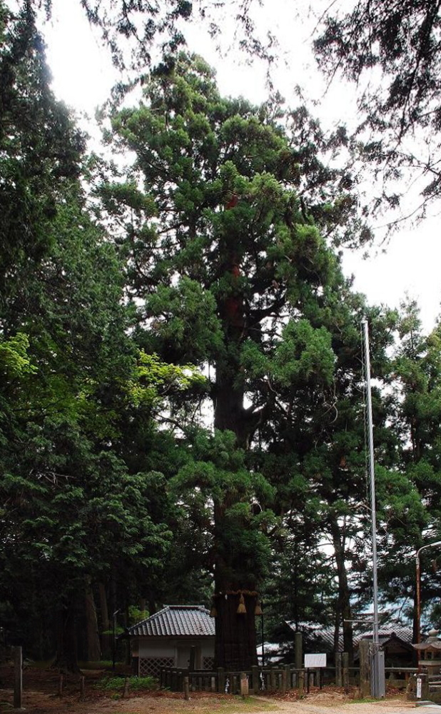 大御食神社の御神木三代目御影の杉